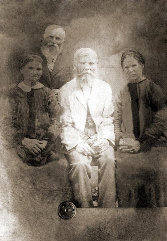 Мальований Кіндрат Олексійович (1844, м. Тараща, нині Київська область — 21 лютого 1913, м. Тараща) — засновник впливового сектантського руху у віт­чизняному штундизмі.